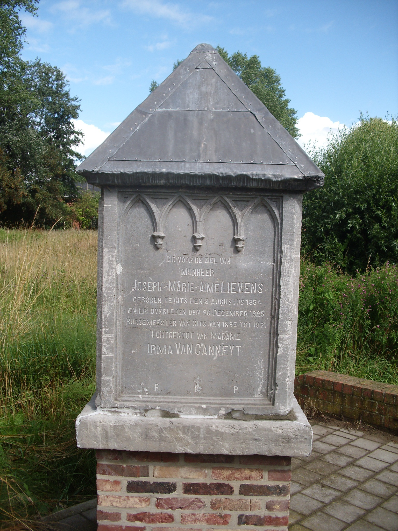 Monument Lievens - Burgemeester Lievenspad - Gitsbergstraat - Gits - Hooglede - West-Vlaanderen - Vlaams Gewest - België